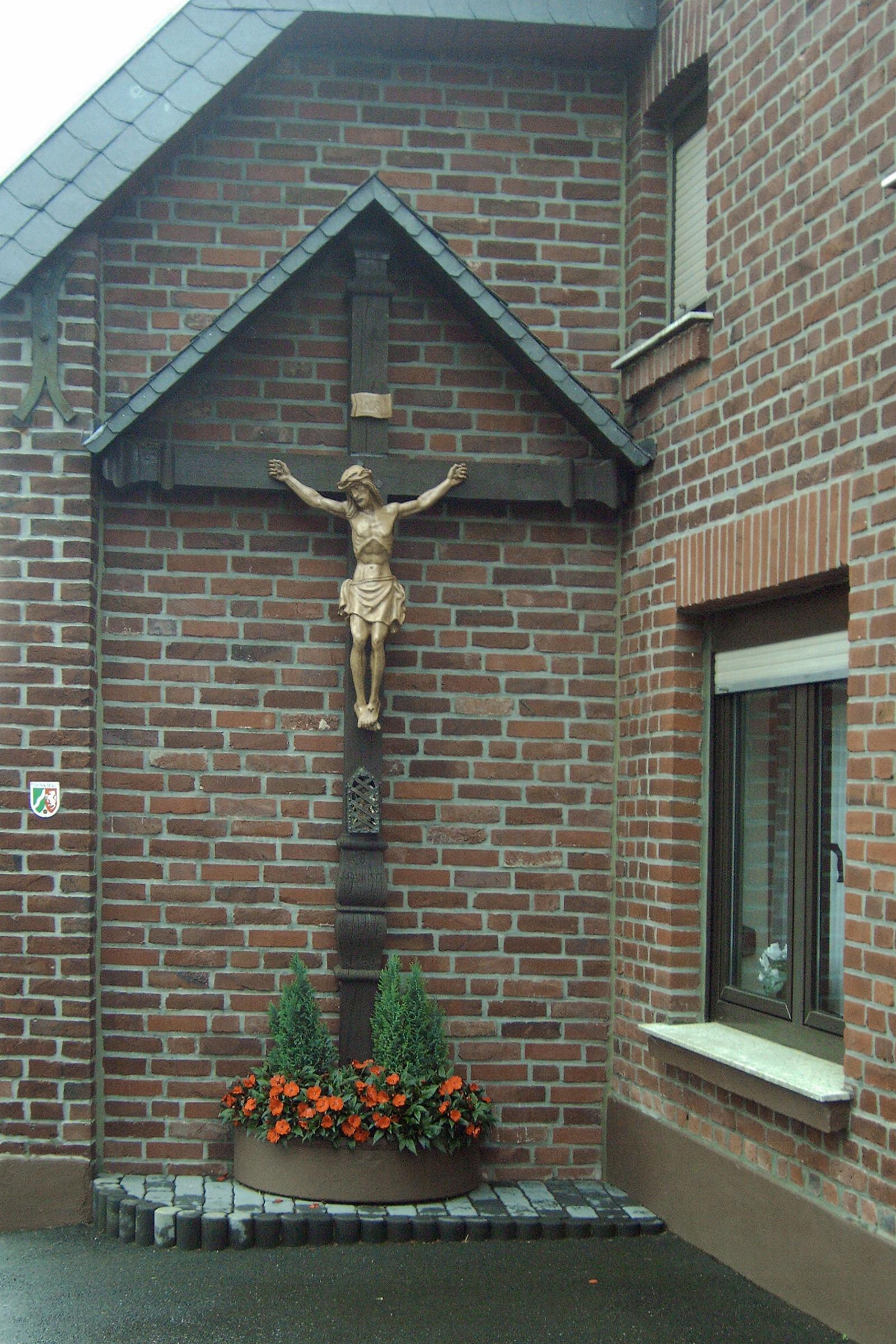 Dorfkreuz in Schömnhausen, auch Denkmal Nr. 108 Wegberg